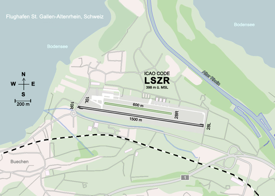 Flughafen St. Gallen-Altenrhein